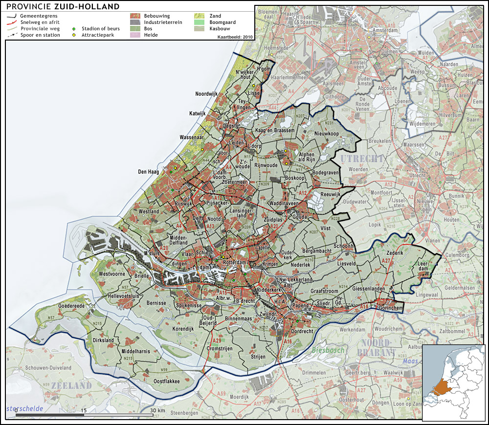 Provincie Zuid-Holland, met indeling van gemeenten (2010) en impressie van het landschap. Door Jan-Willem van Aalst, samengesteld uit publiek beschikbare geo-data: Referentie-ondergrond (kustlijn, steden, wegen) gerasterd uit de OpenStreet Map OSM. ( Inhoud is beschikbaar onder de Creative Commons Attribution-ShareAlike 3.0 license. Referentie-ondergrond op water bewerkt vanuit Gebruik is vrij met bronvermelding NLR en ESA. Vectorgrenzen van gemeenten en regio's vrij ter beschikking gesteld met dank aan cartografen van brandweerregio's Hollands-Midden en IJsselland; gerasterd in Photoshop. Hoogte-aanduidingen (reliëf) gerasterd uit de AHN Viewer ( gebruik is vrij met bronvermelding (c) AHN, Overige kenmerken op de kaart: eigen tekenwerk van Jan-Willem van Aalst, op basis van gerasterde gemeentegrenzen.